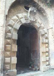 Portale